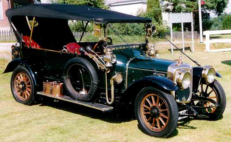 Panhard & Levassor X 19 (10 HP) 1914